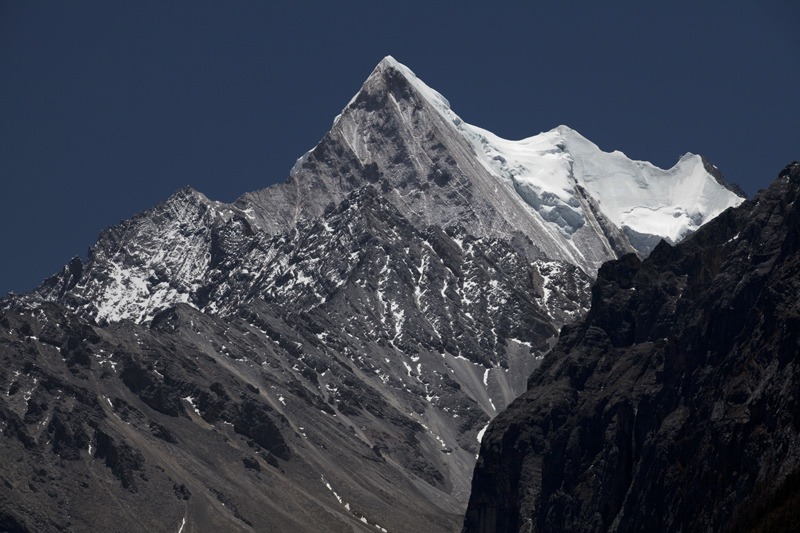 夏诺多吉雪山，中国四川稻城亚丁